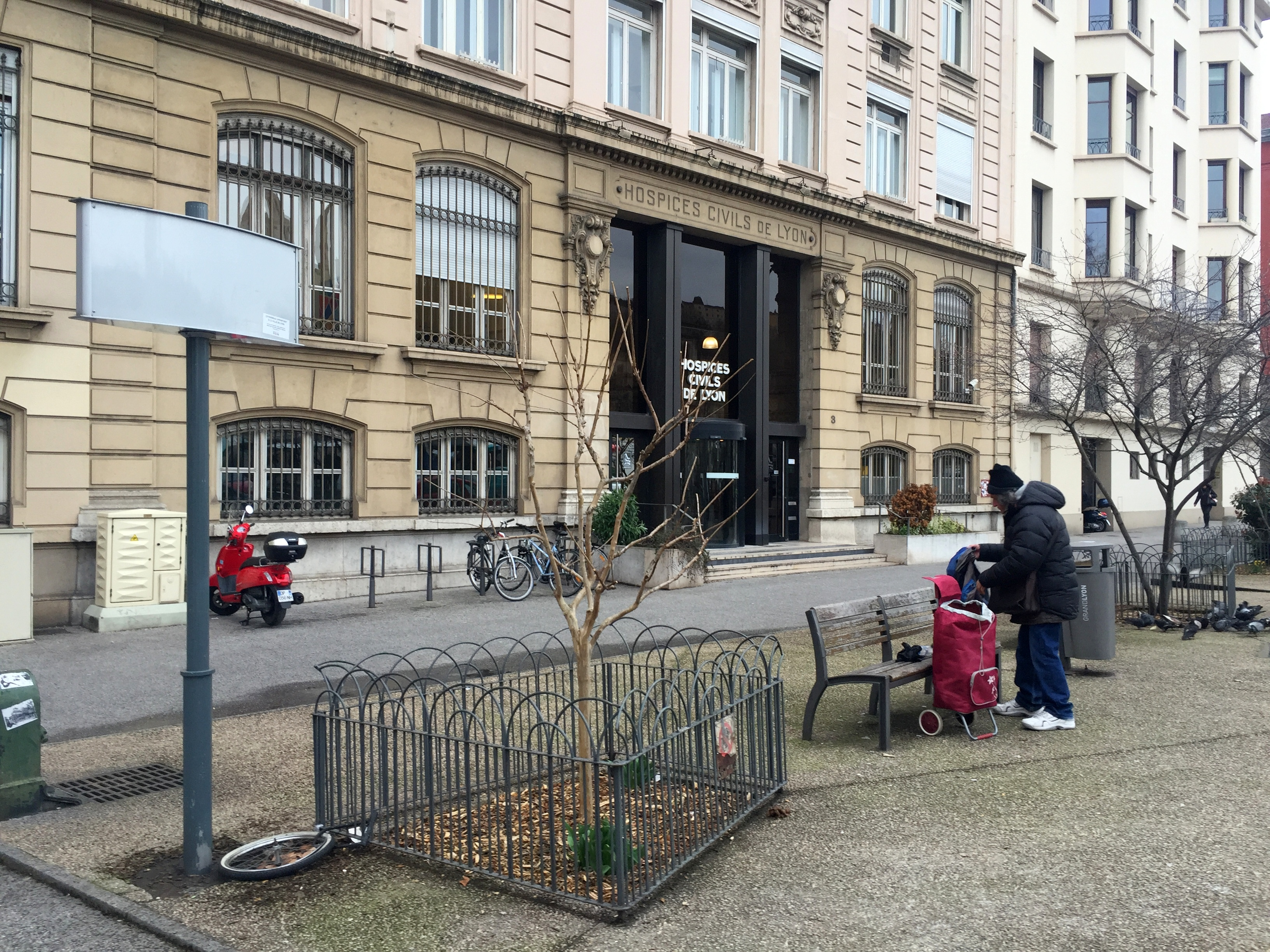 Image de Lyon en mars 2016.